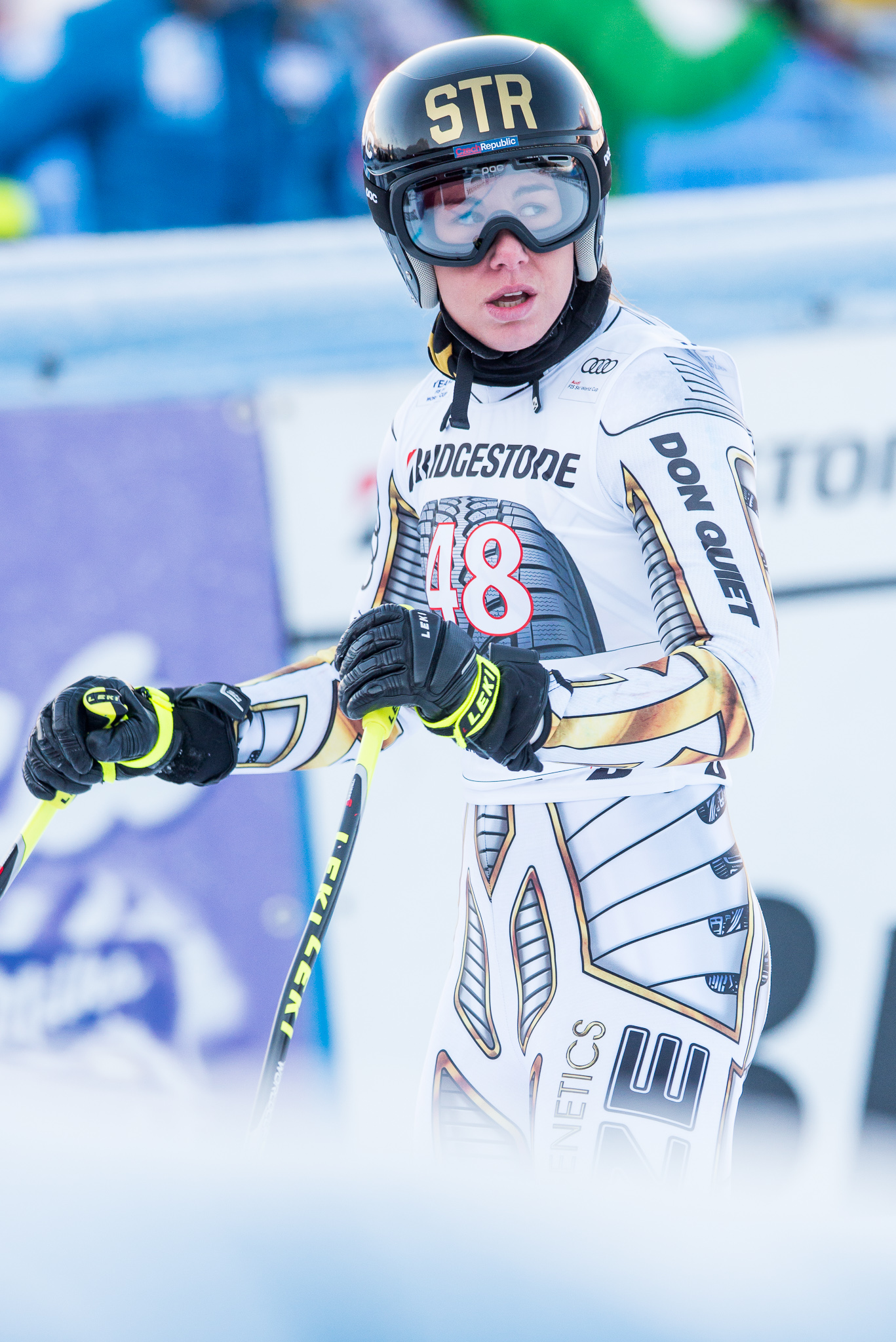 64. Kandahar Rennen,Audi FIS Ski Weltcup Garmisch-Partenkirchen,Damen Abfahrt,Ester Ledecka,Ester Ledecká,Kandahar,Ladies Downhill